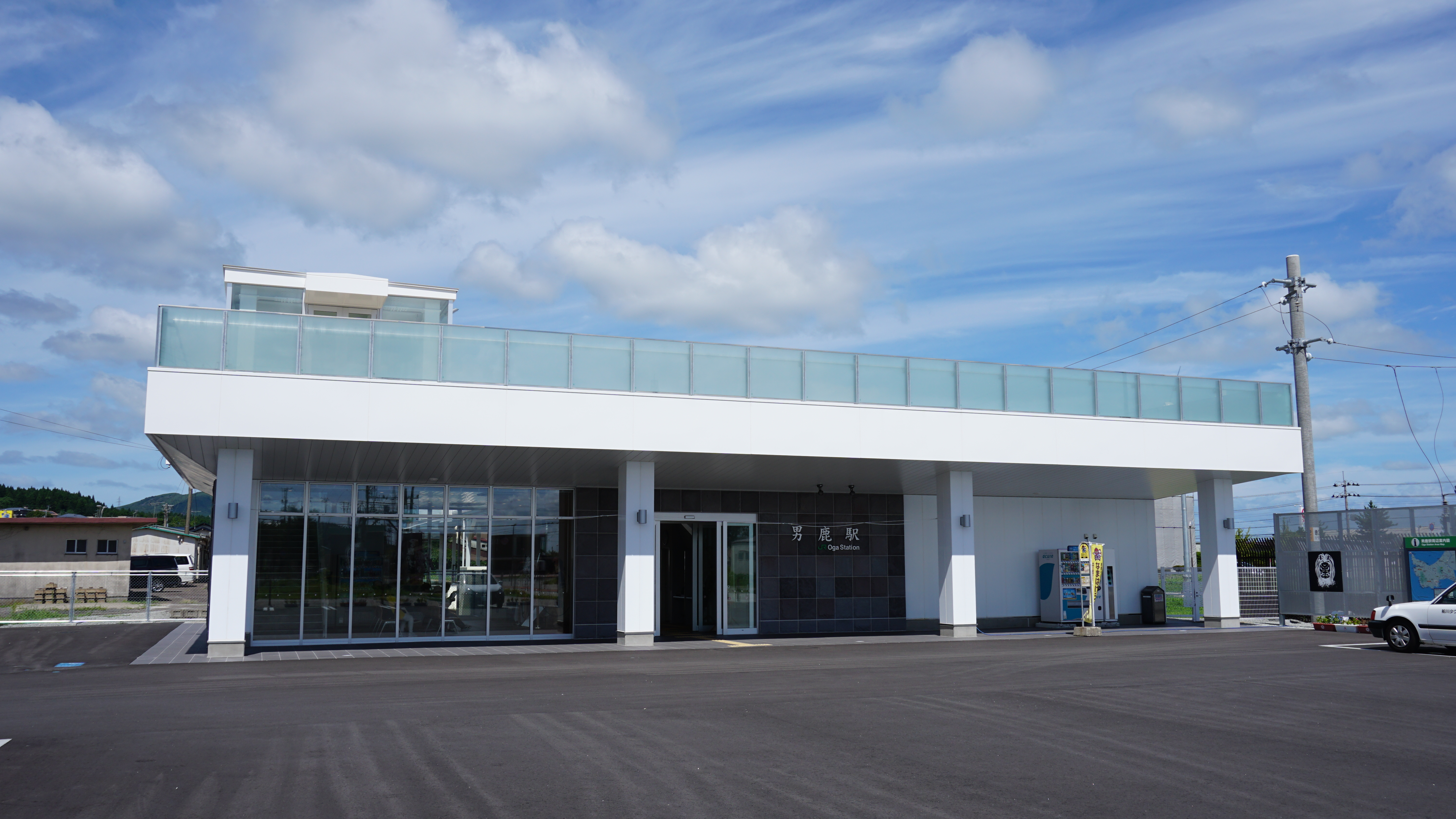 男鹿駅 新駅舎